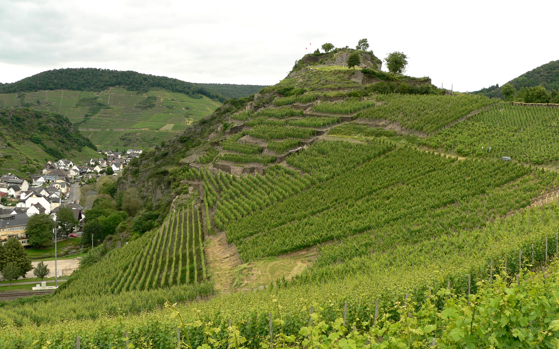 Saffenburg